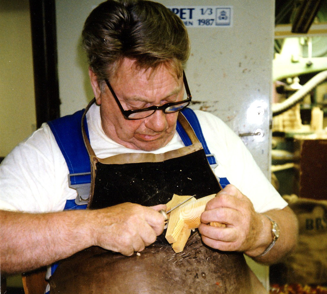 Dalahästtillverkning